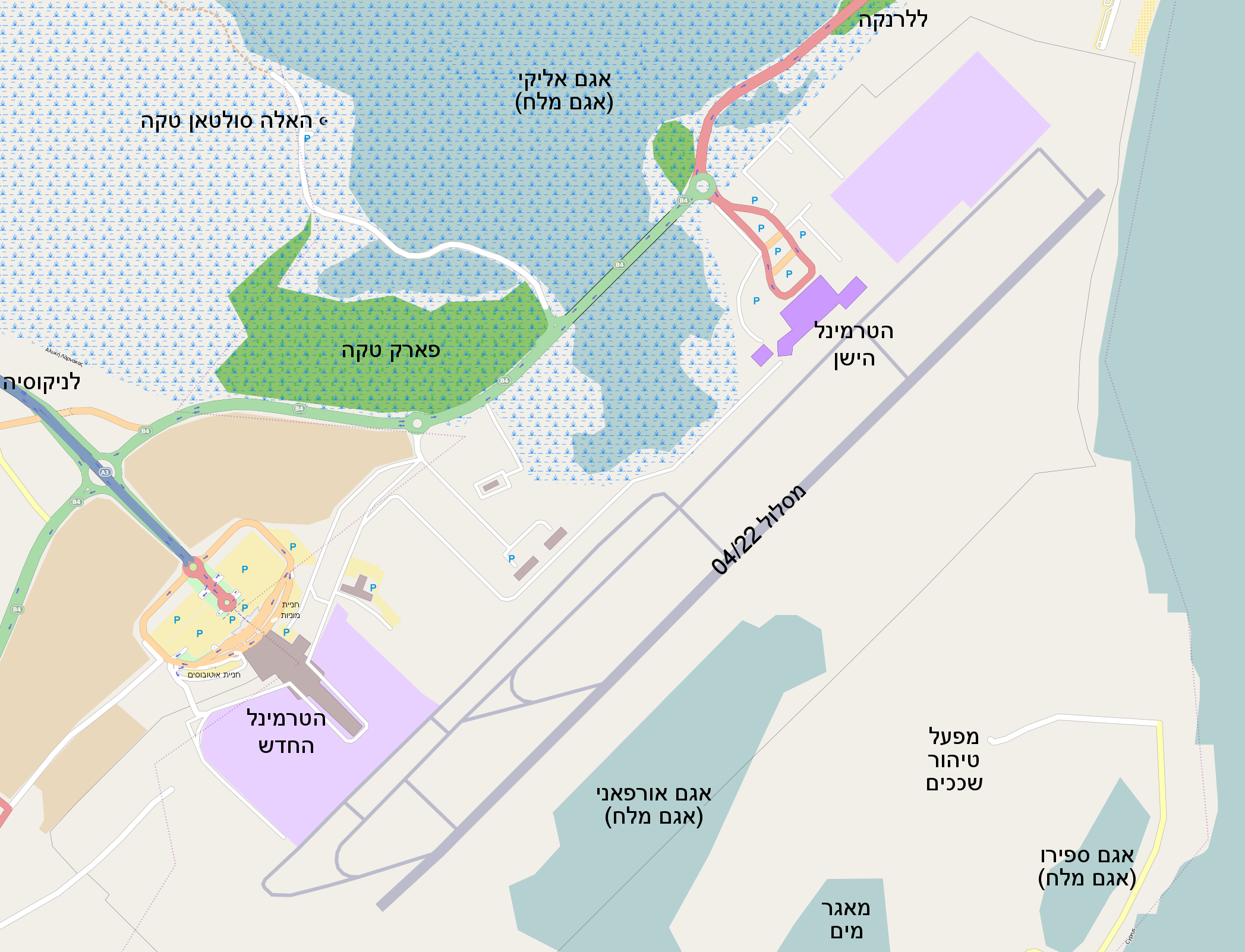 LCA map